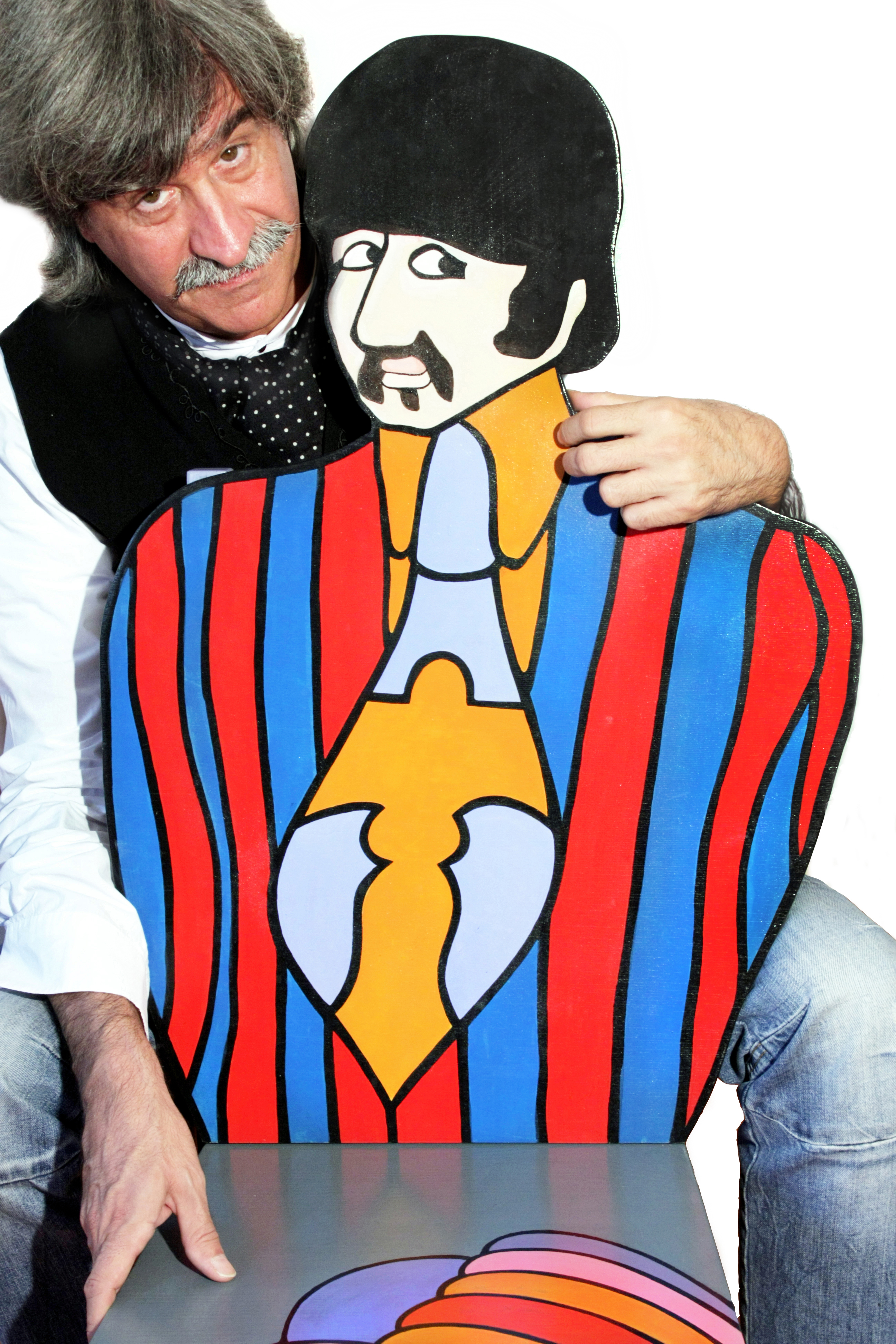 Ezio Guaitamacchi